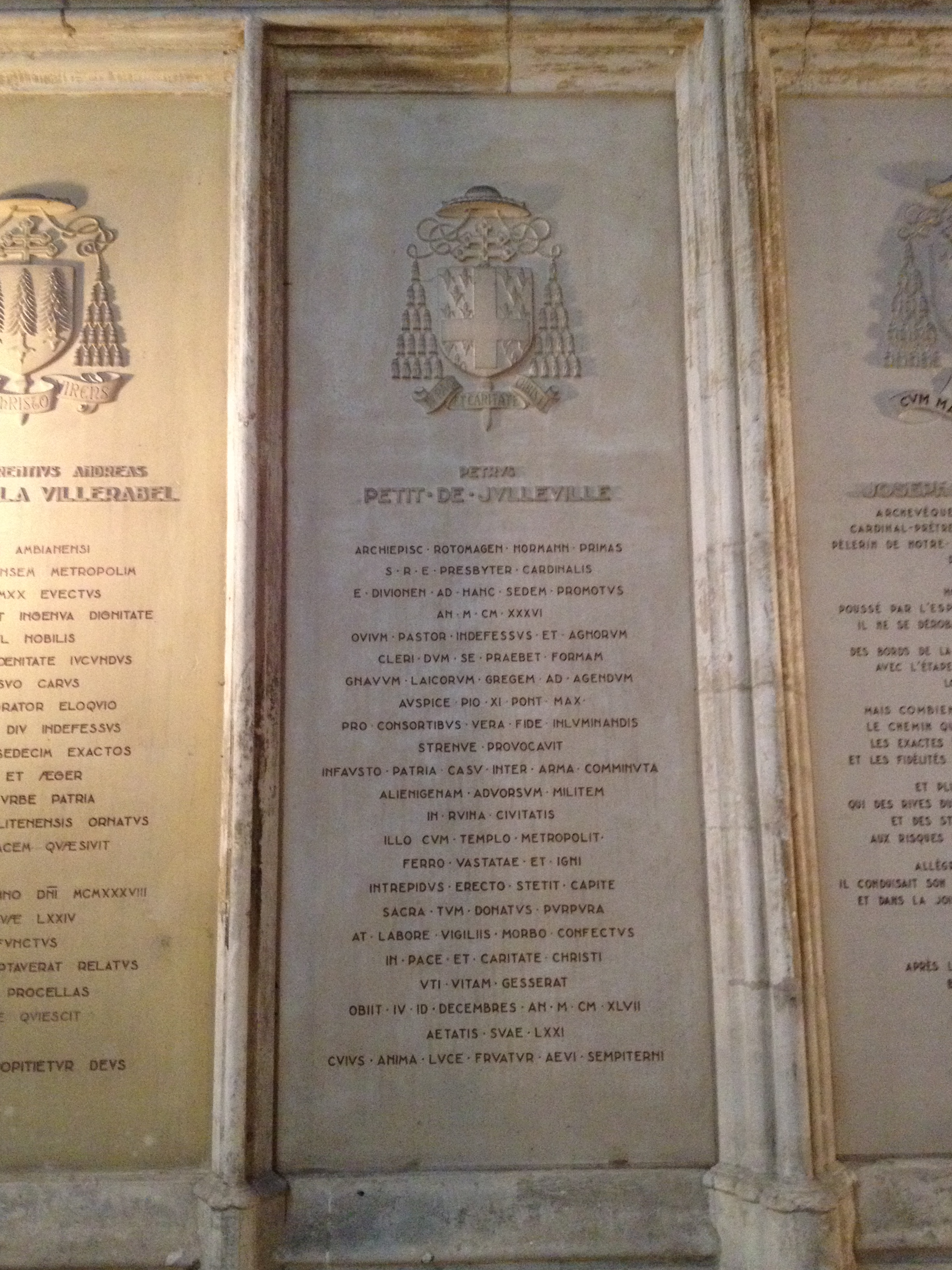 Plaque commémorative de Pierre Petit de Julleville.